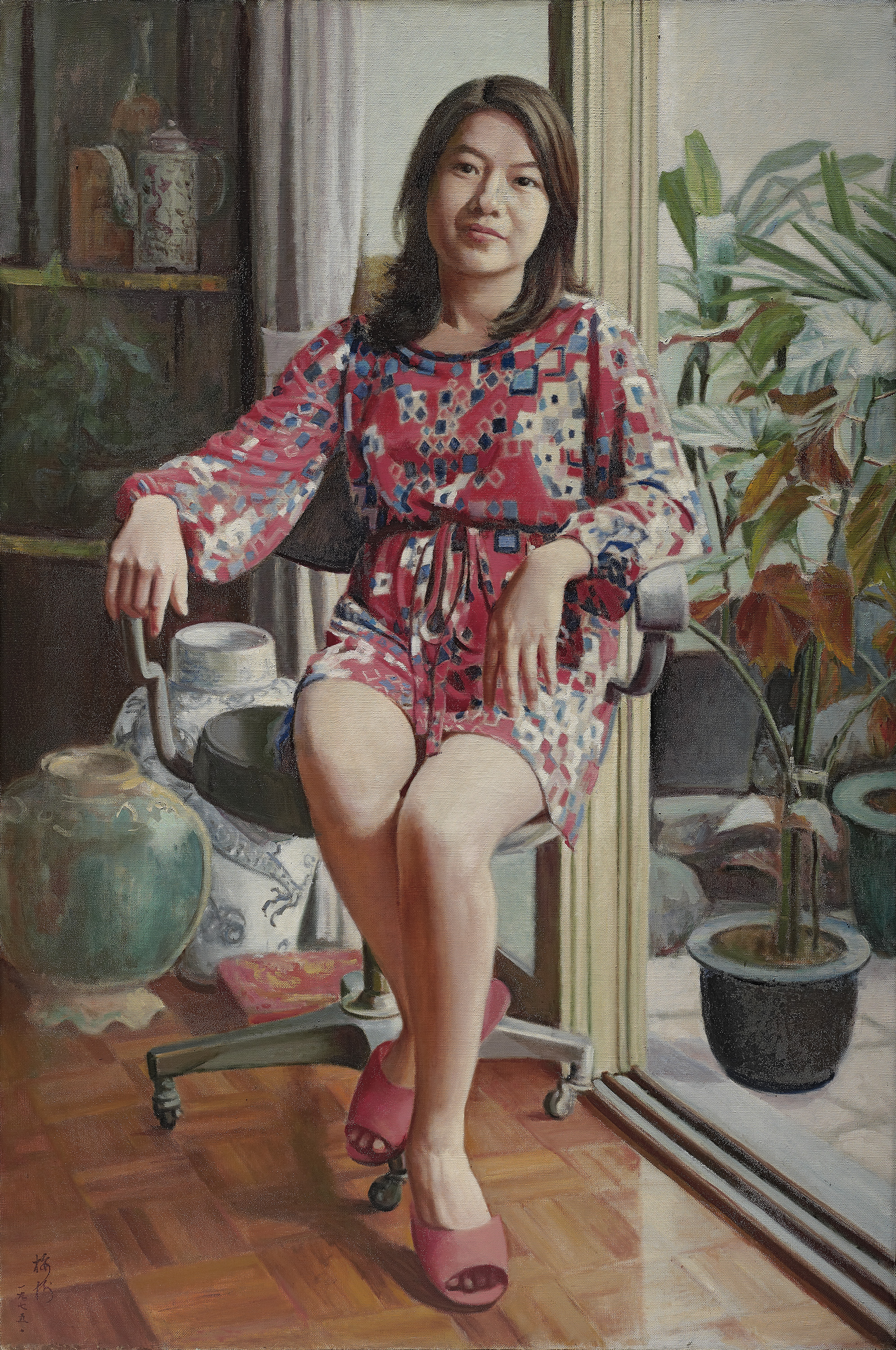 中文（台灣）: 李梅樹作品：Relaxing On A Holiday 假日閒情，1975，油彩。